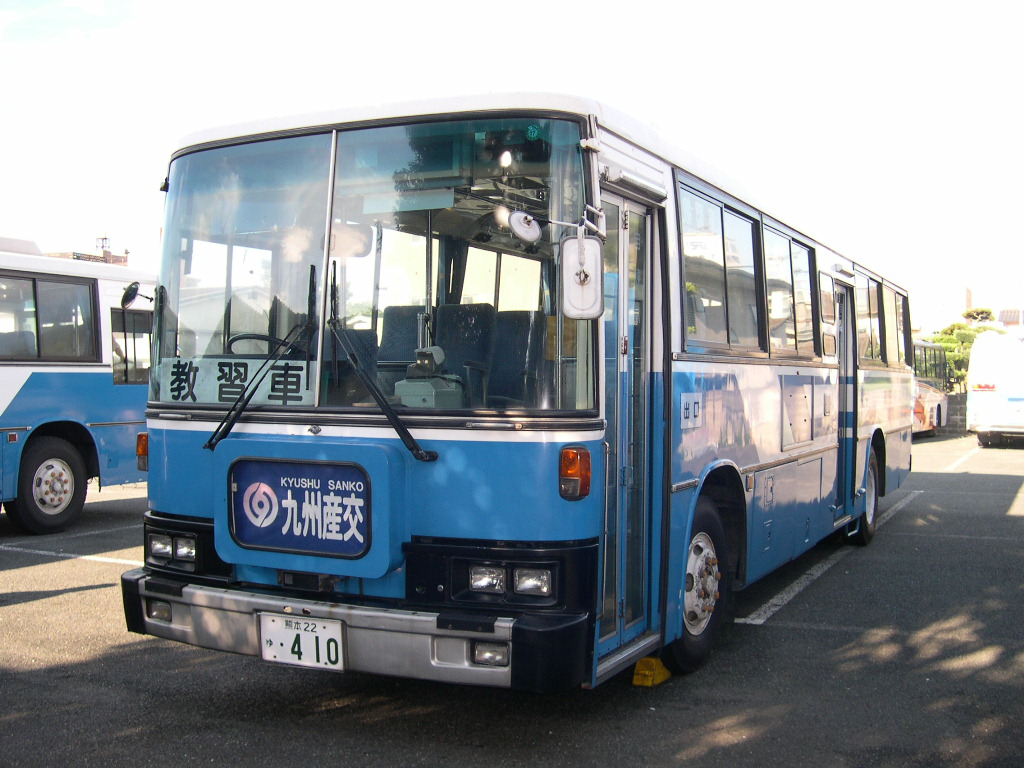 教習車（九州産交）